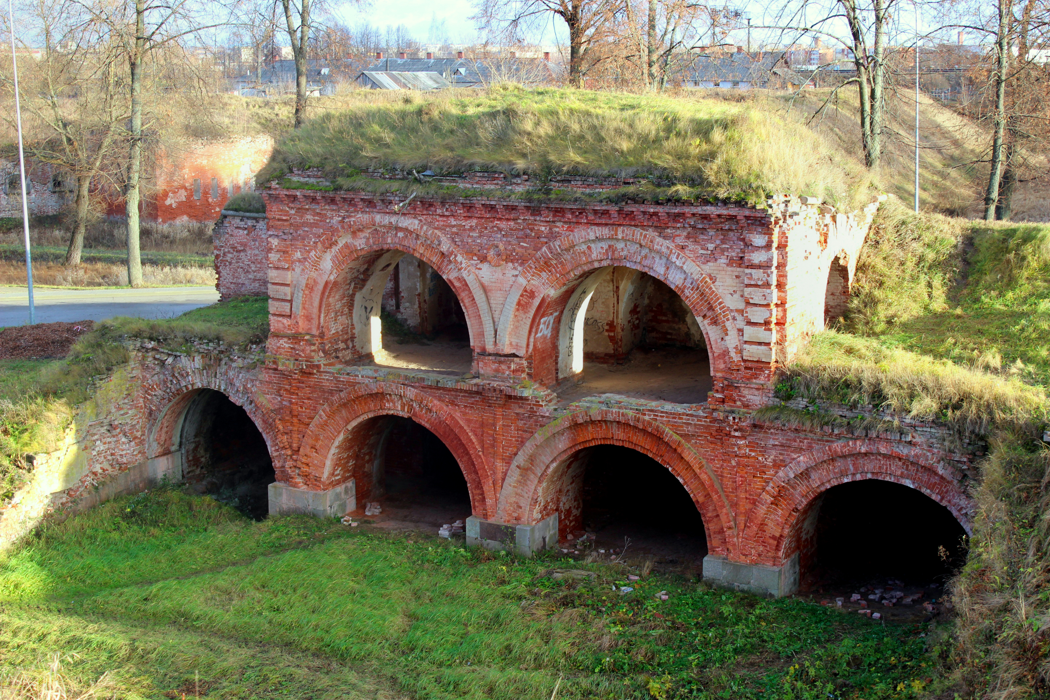 Daugavpils cietoksnis / fortress